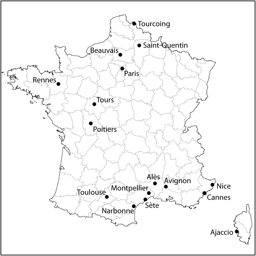 Clubs participant à l'édition 2009-2010 du championnat de France Pro A de volley-ball